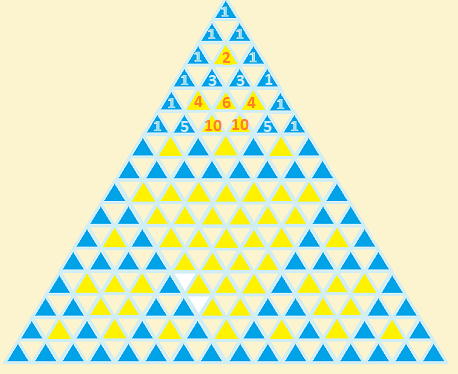 Le triangle de Pascal est inscrit dans une trame triangulaire. On a colorié les cellules en jaune ou en bleu suivant la parité des termes qui y sont inscrits.